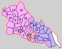 三重県員弁郡の町村制時点の町村。